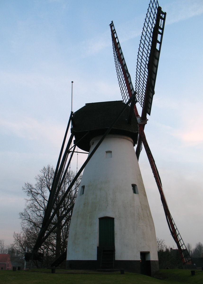 Molen van Ezaart te Mol, provincie Antwerpen